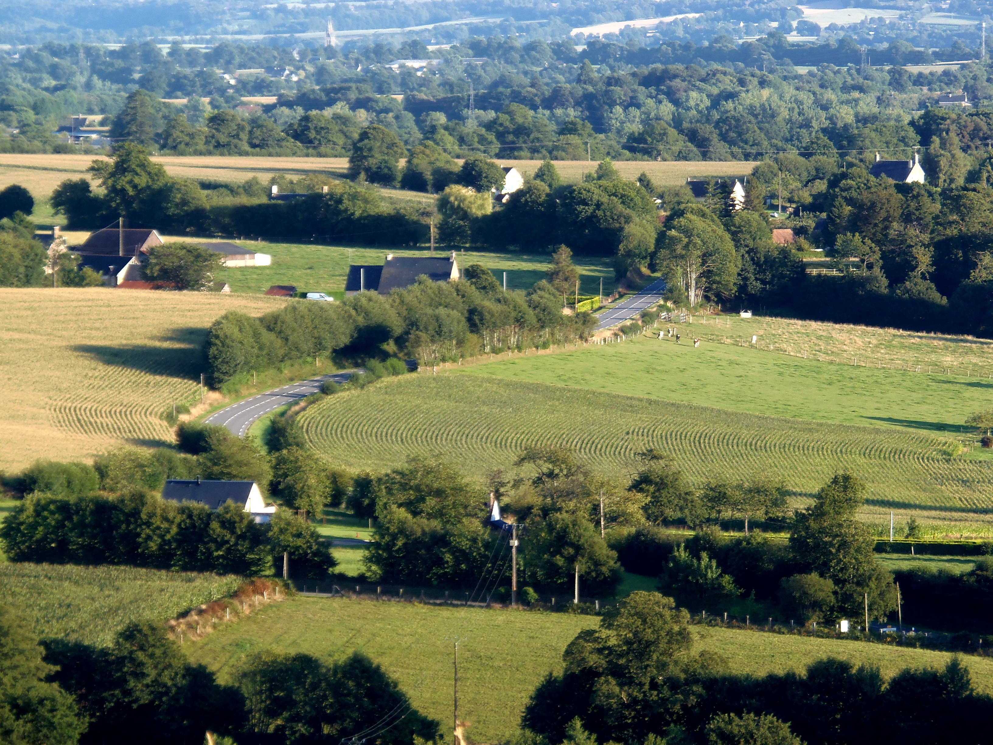 Montigny, commune d'Isigny-le-Buat (Normandie, France). Vue sur la route départementale 999, ancienne route nationale 799. En arrière plan, les tours de l'église de Saint-Hilaire-du-Harcouët.